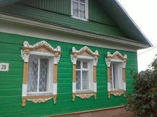 Дом в Скородумово